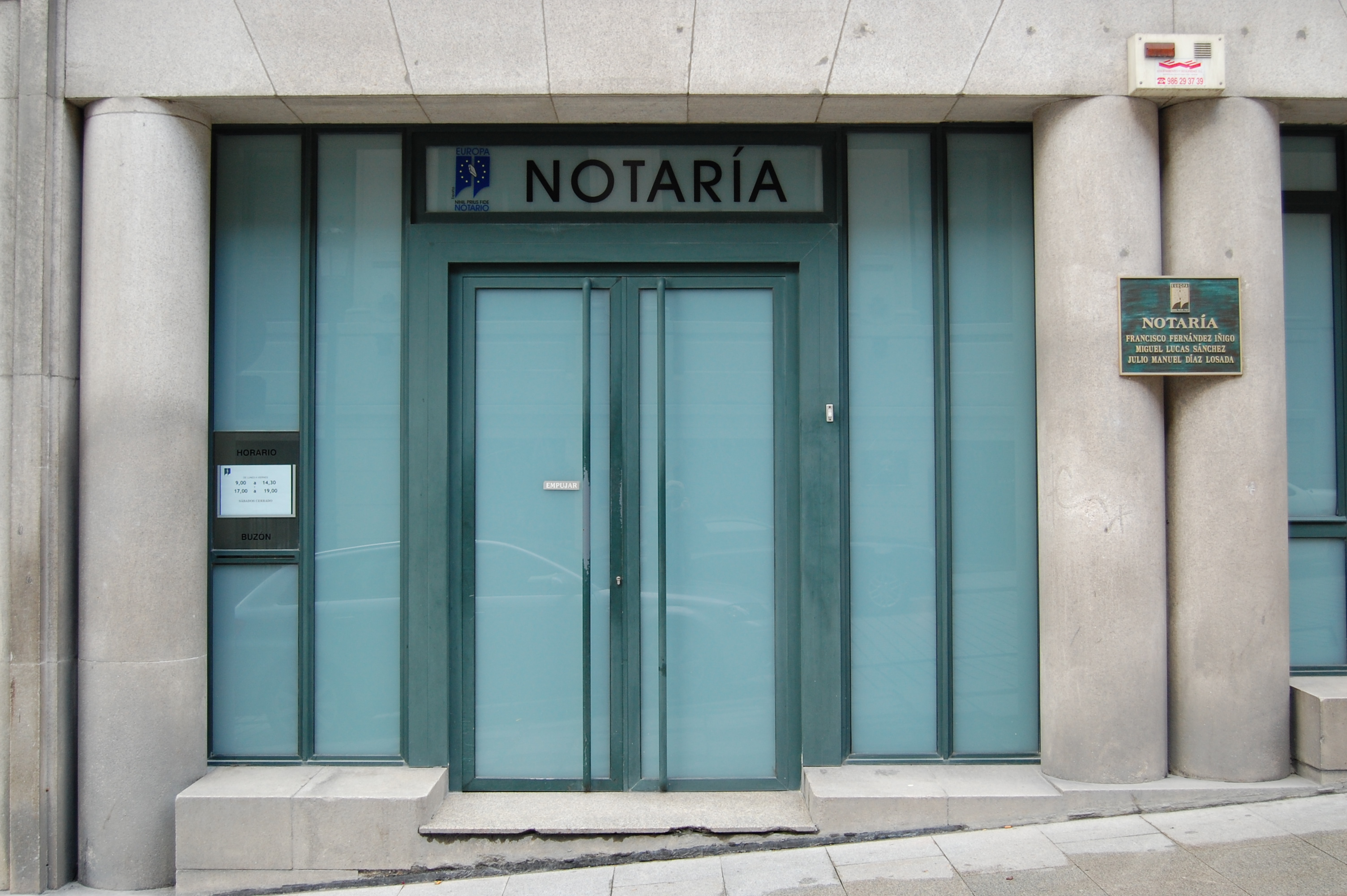 Um ofício notarial em Vigo (rua Velásquez Moreno).